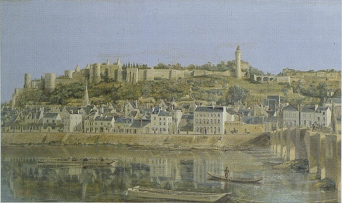 Fortuné Viau - Vue de Chinon - Oil Painting